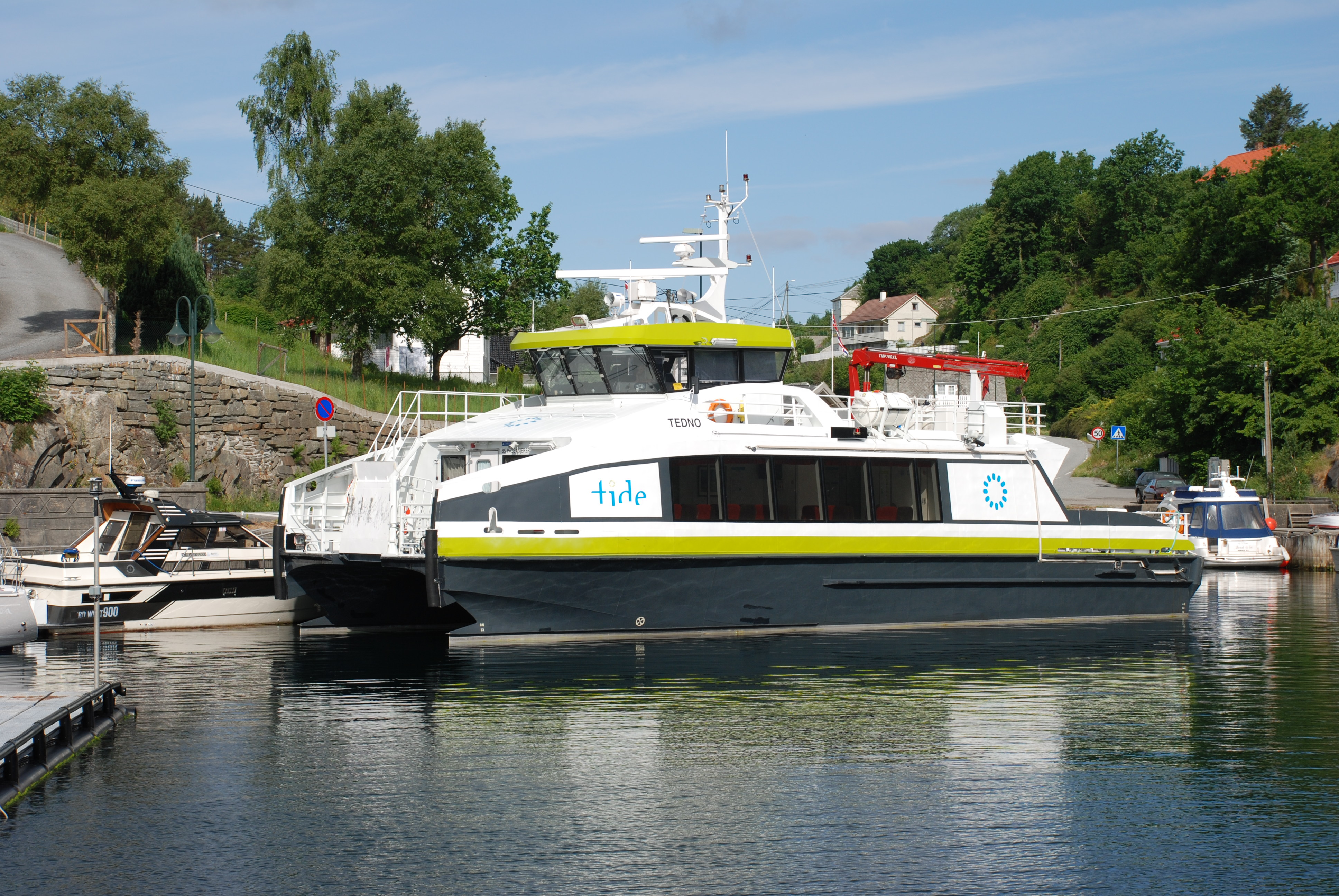 MS Tedno i Bekkjarvik, Austevoll i 2008. Foto: Harald Sætre.